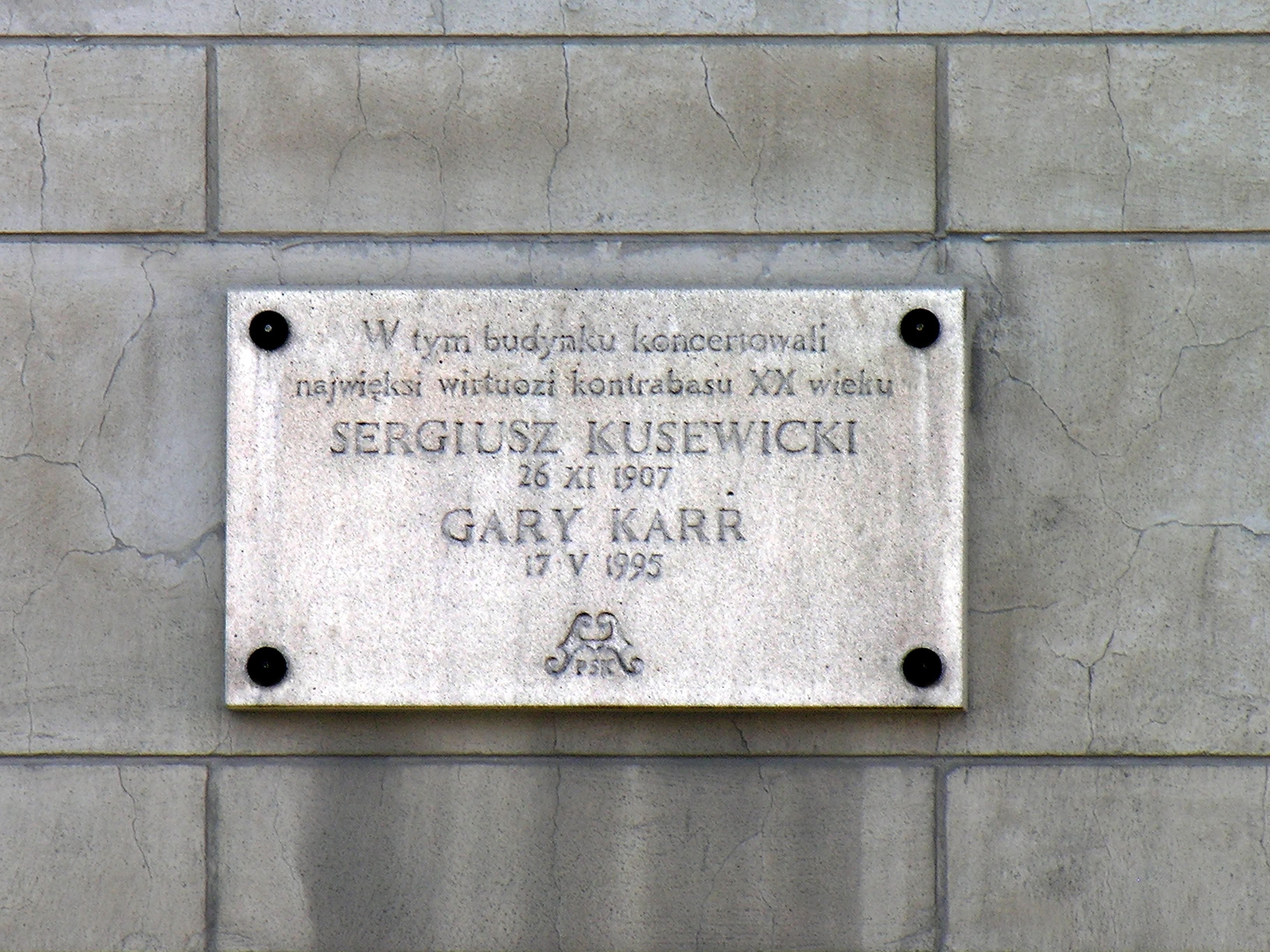 Tablica na pamiątkę koncertów Kusewickiego i Karra w Starej Giełdzie we Wrocławiu, ul. Krupnicza 15